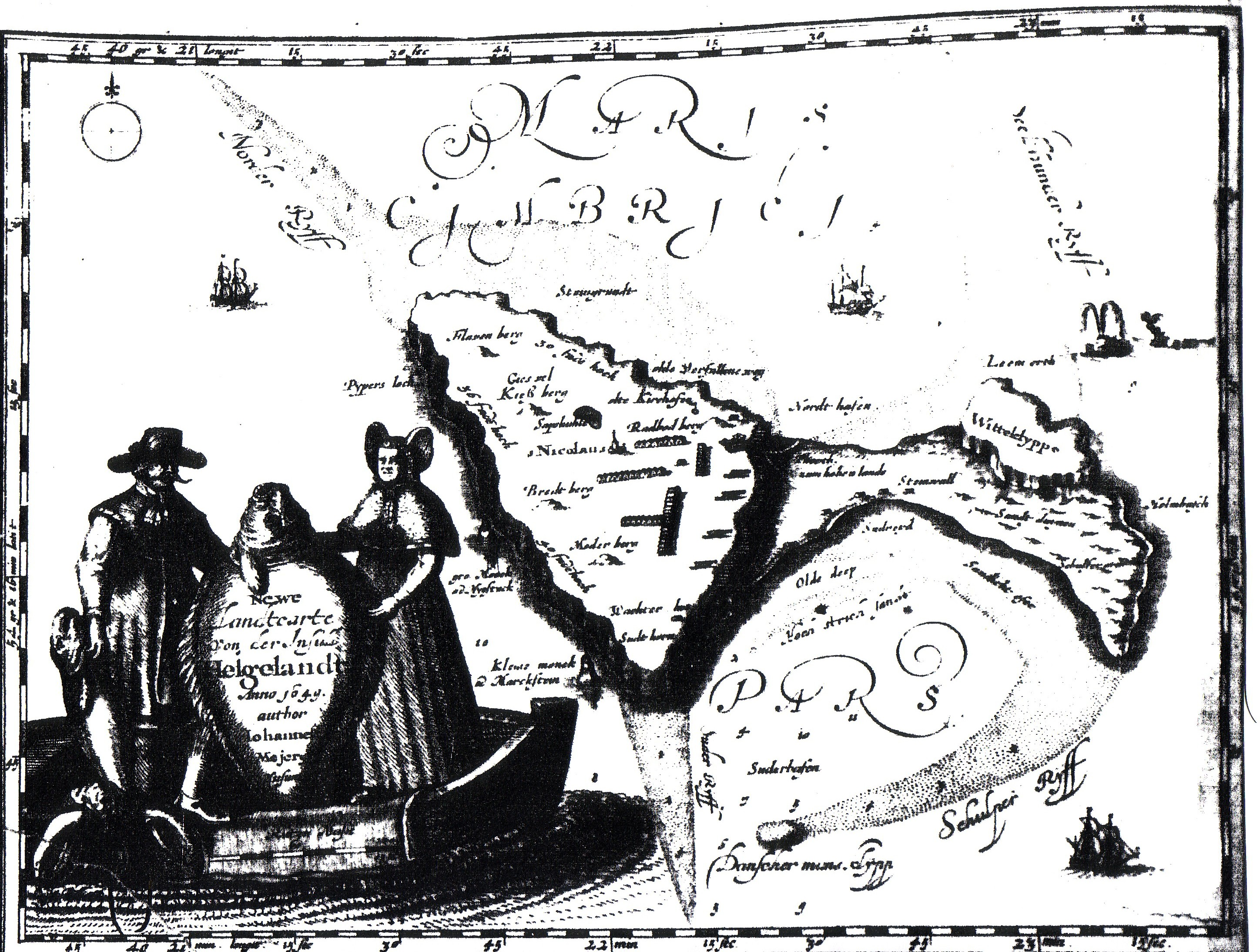 Karte der Insel Helgoland von 1649.